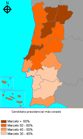 Resultados das eleições presidenciais de 2016 por distritos e regiões autónomas